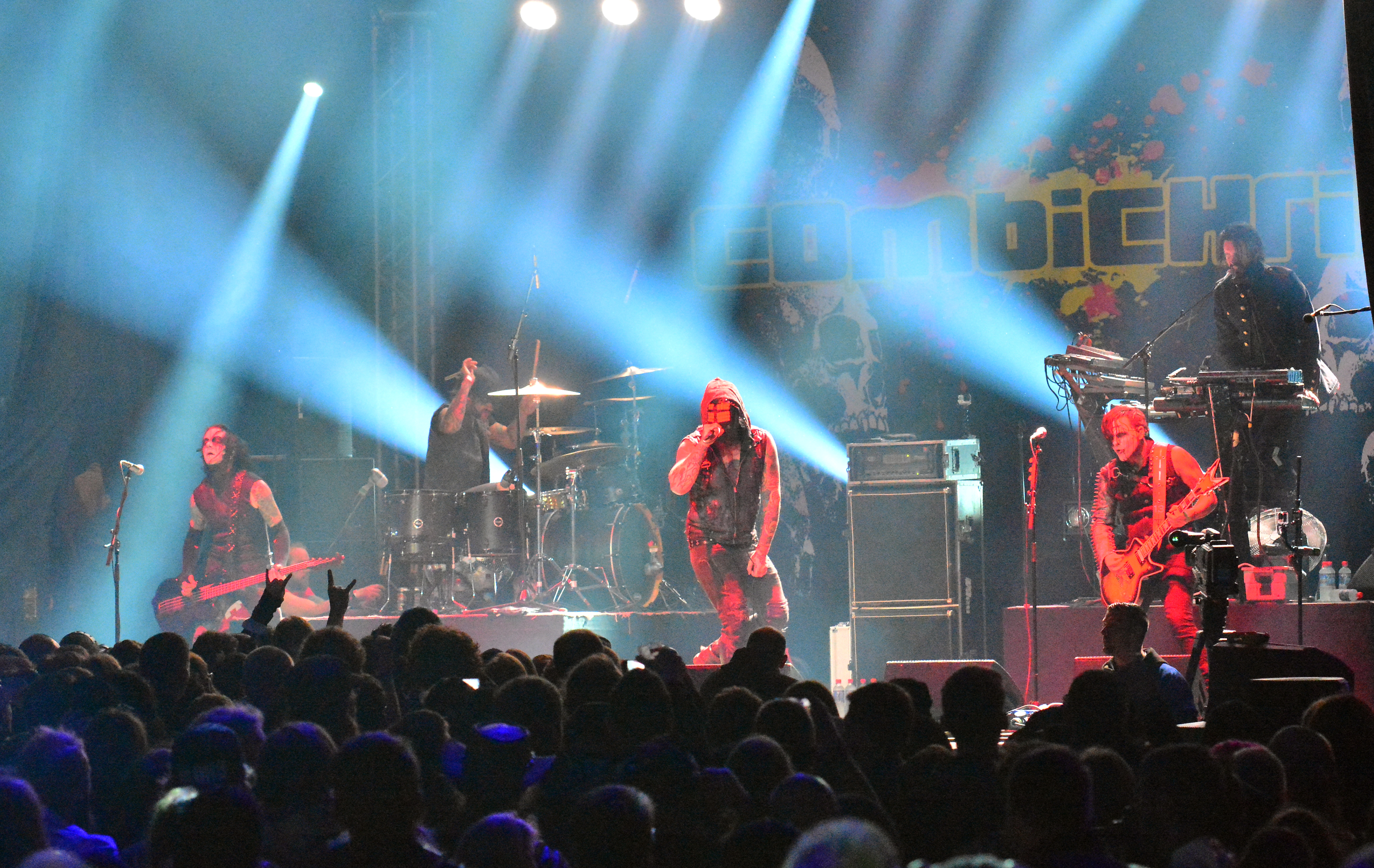 Combichrist beim Wacken Open Air 2015